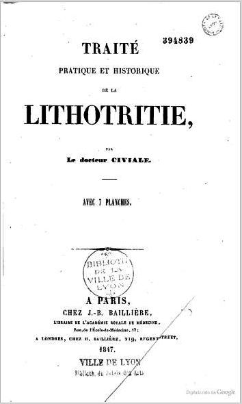 Frontespizio con informazioni editoriali legate all'opera di Civiale